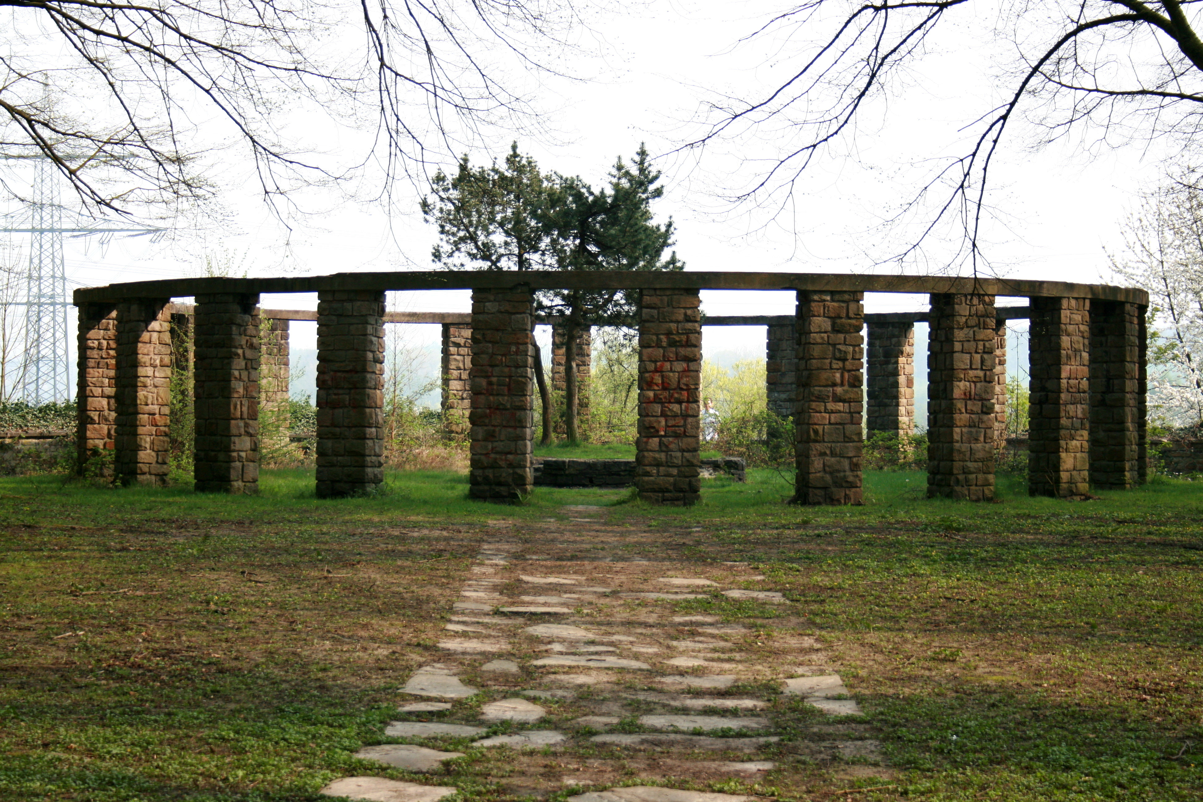 Denkmal (zwischen Haus Horst und Ruhr) in Essen-Horst